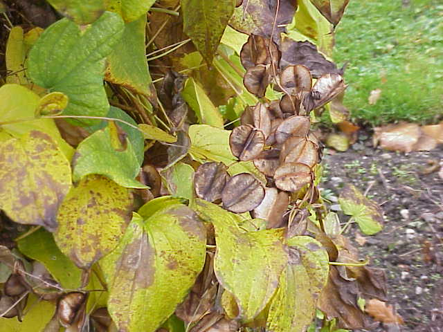 Species: Dioscorea balcanica Family: Dioscoreaceae Image No. 1